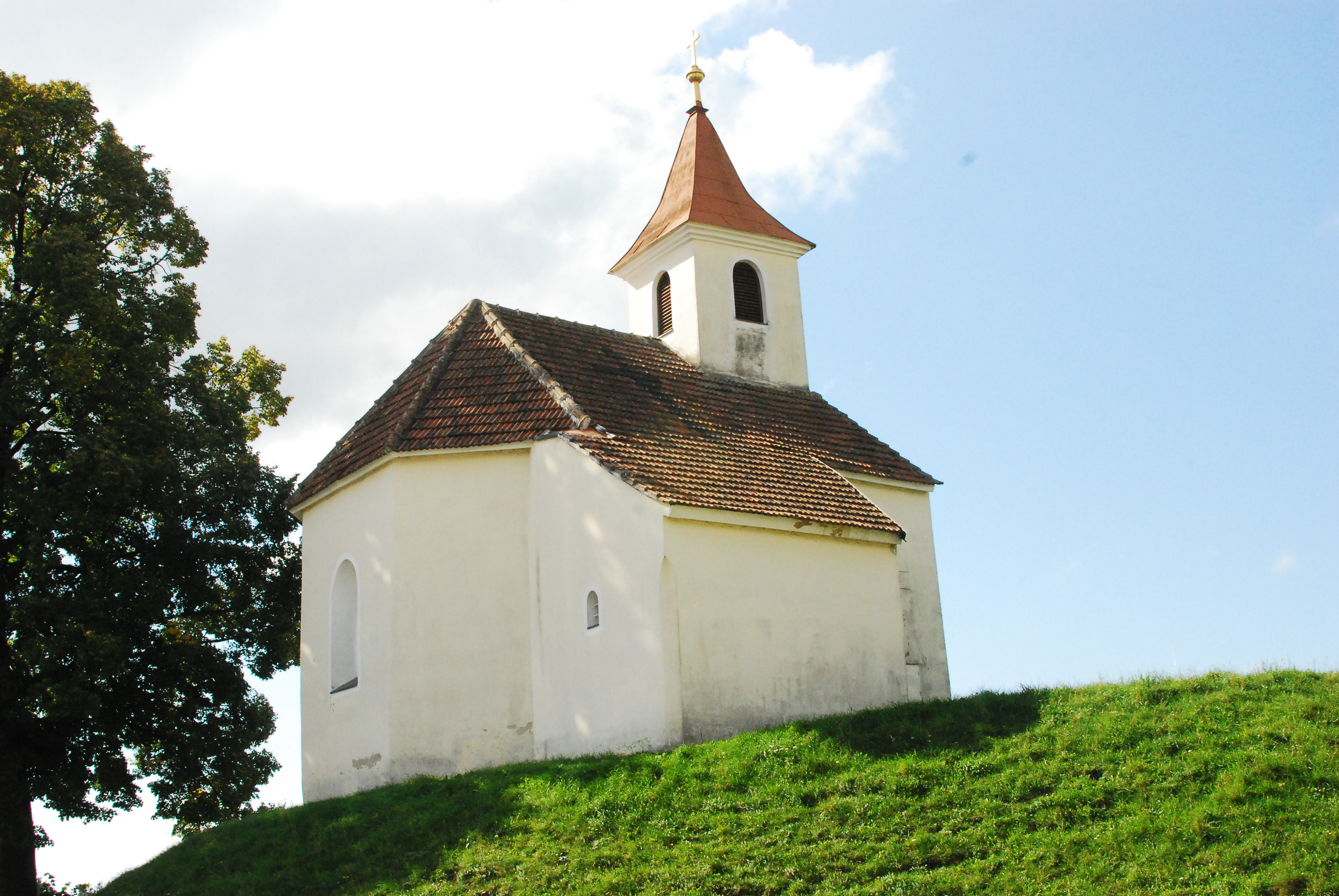 Ehem. Burgkapelle hl. Veit